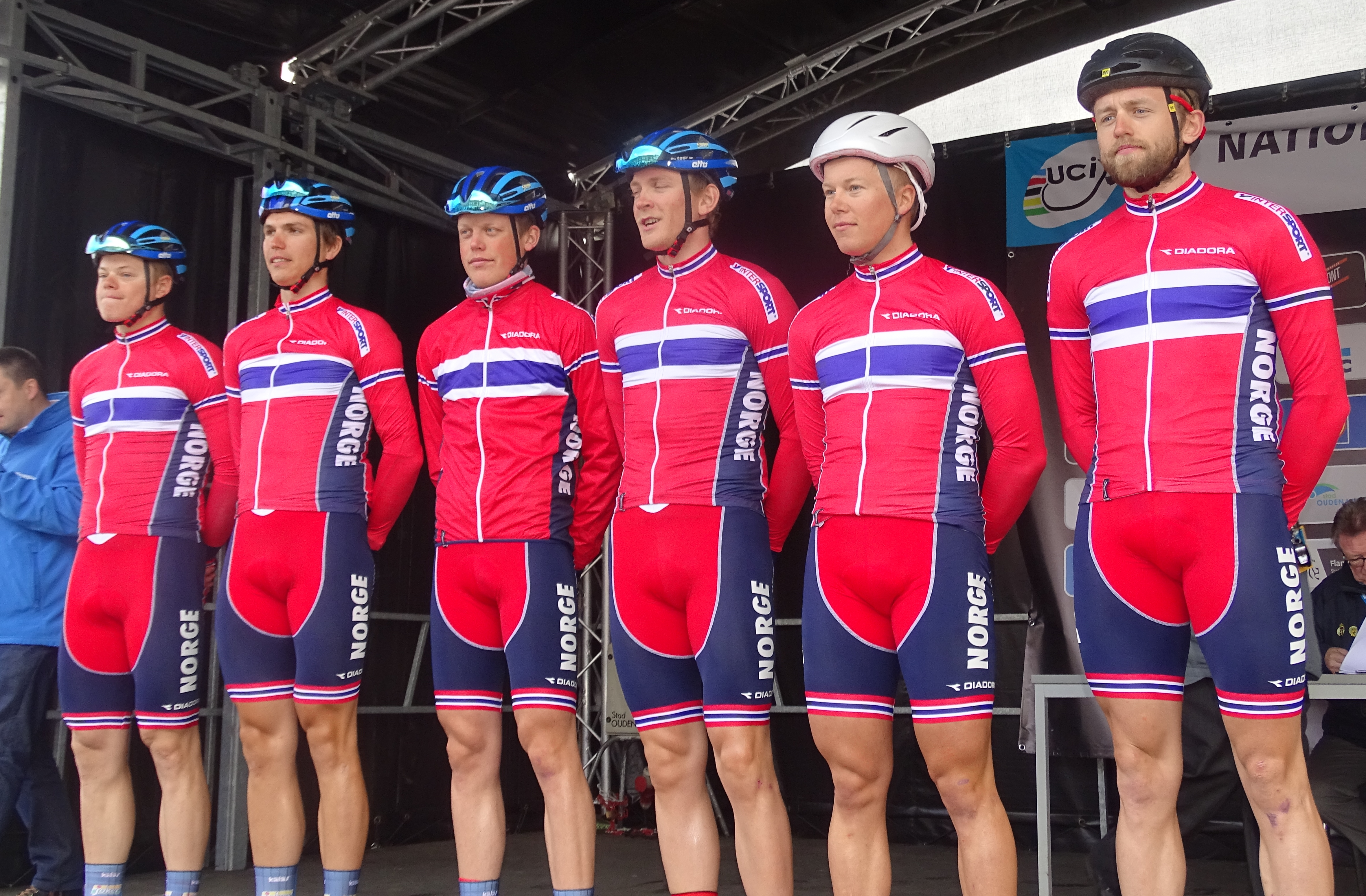 Reportage réalisé le samedi 11 avril à l'occasion du départ et de l'arrivée du Tour des Flandres espoirs 2015 à Audenarde, Belgique.